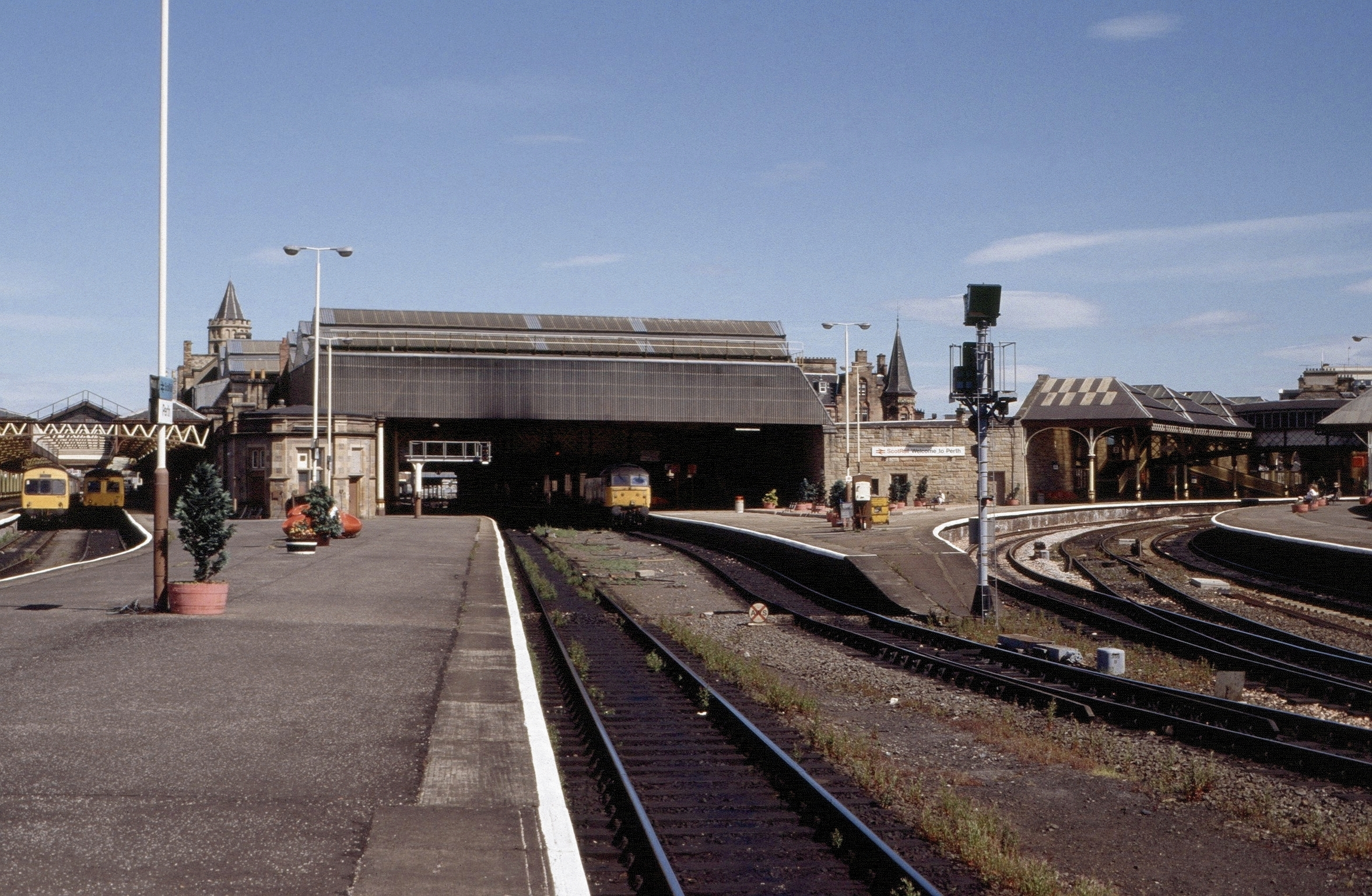 Bahnhof Perth (Schottland)